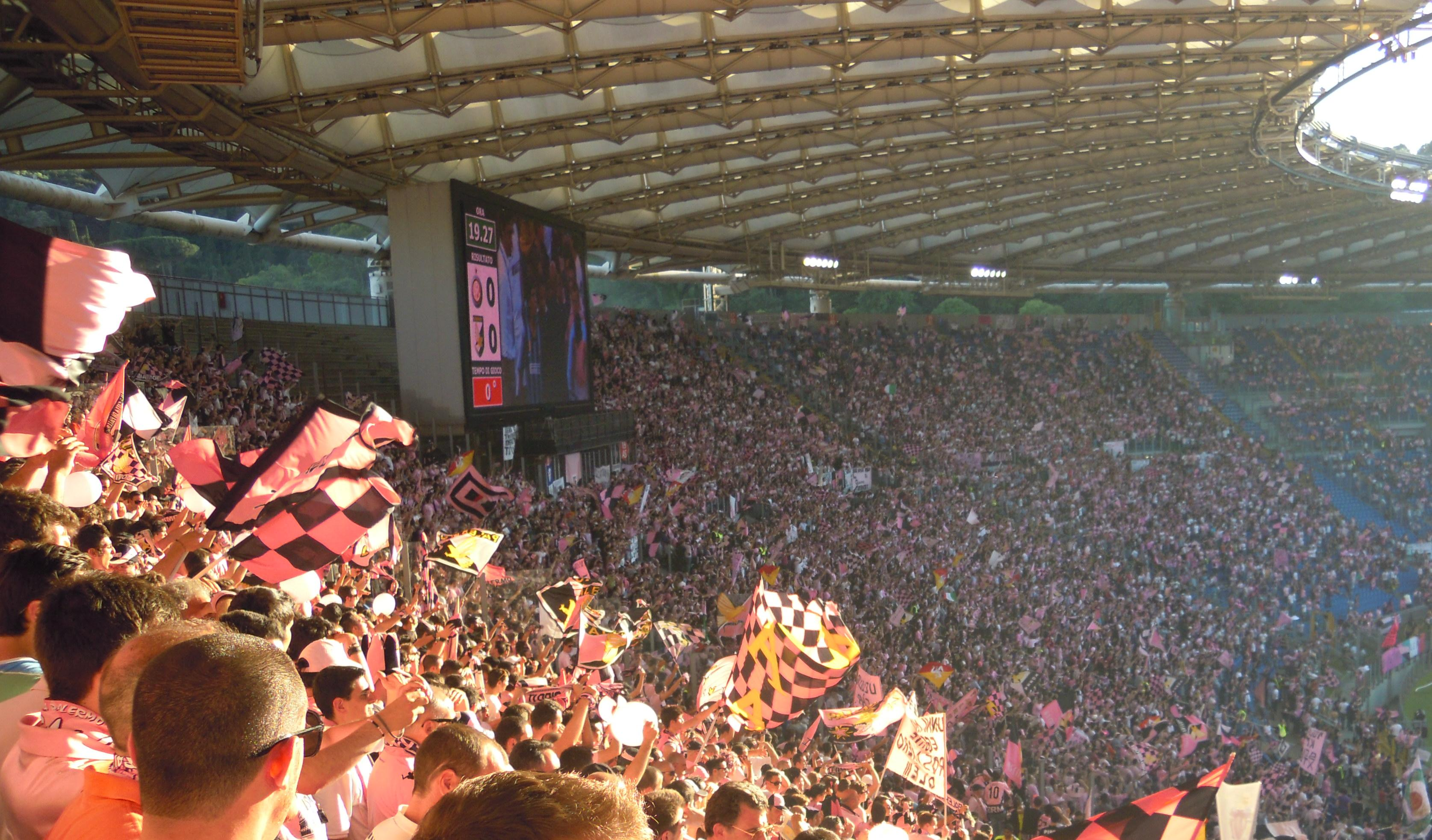 Curva sud dello stadio olimpico di Roma, occupata dai tifosi del Palermo in occasione della finale di Coppa Italia 10-11